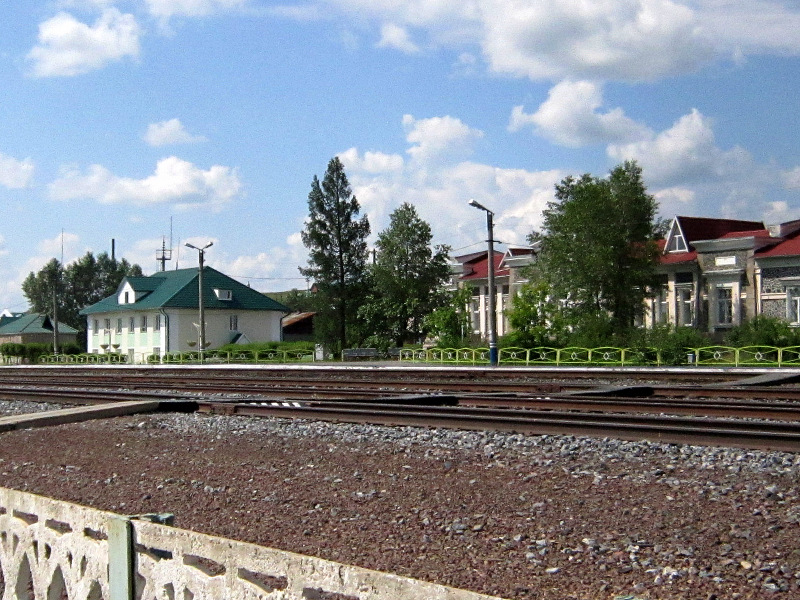 Вокзал станции Шира (Хакасия).